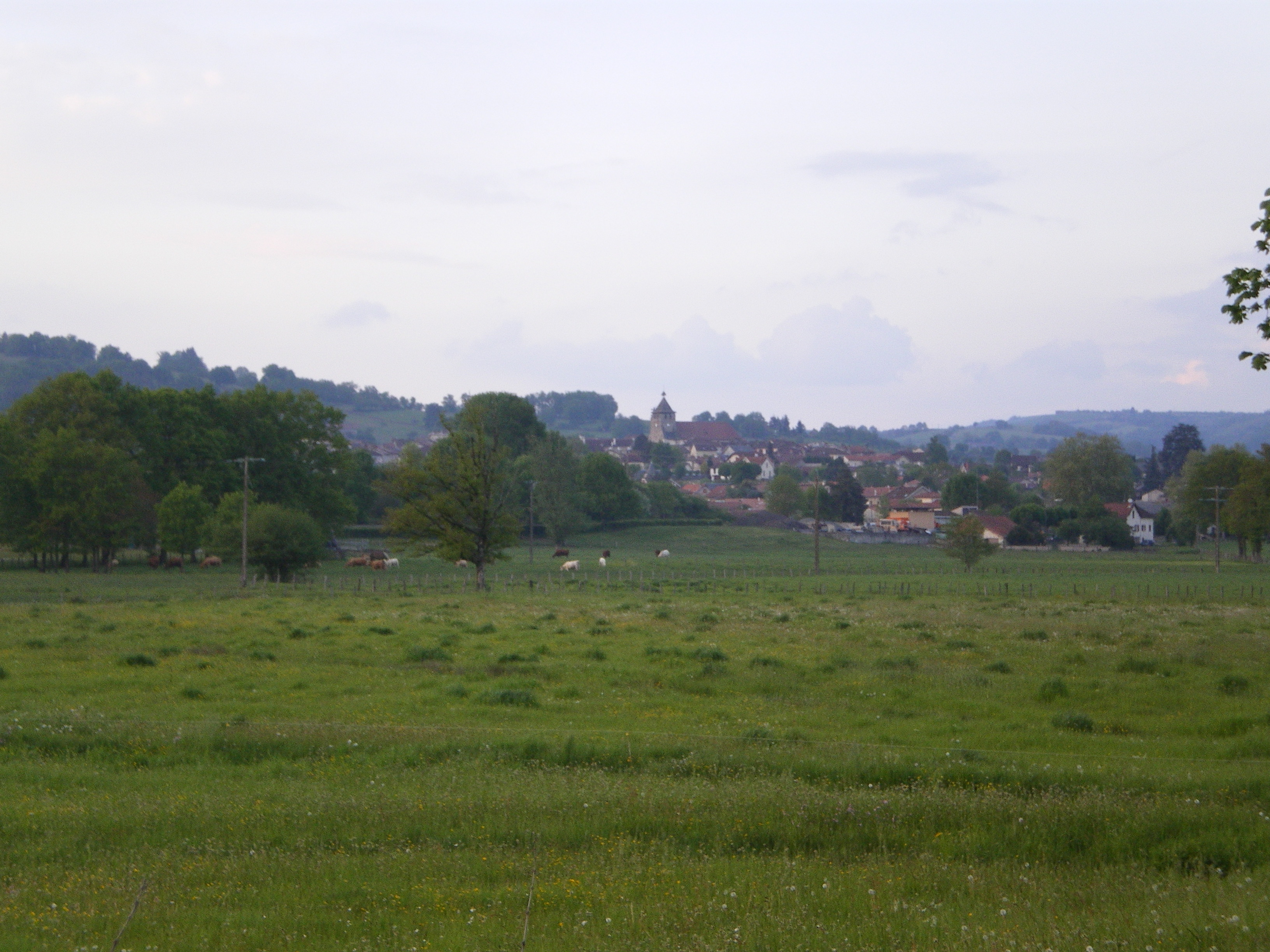 Maurs, Cantal, France